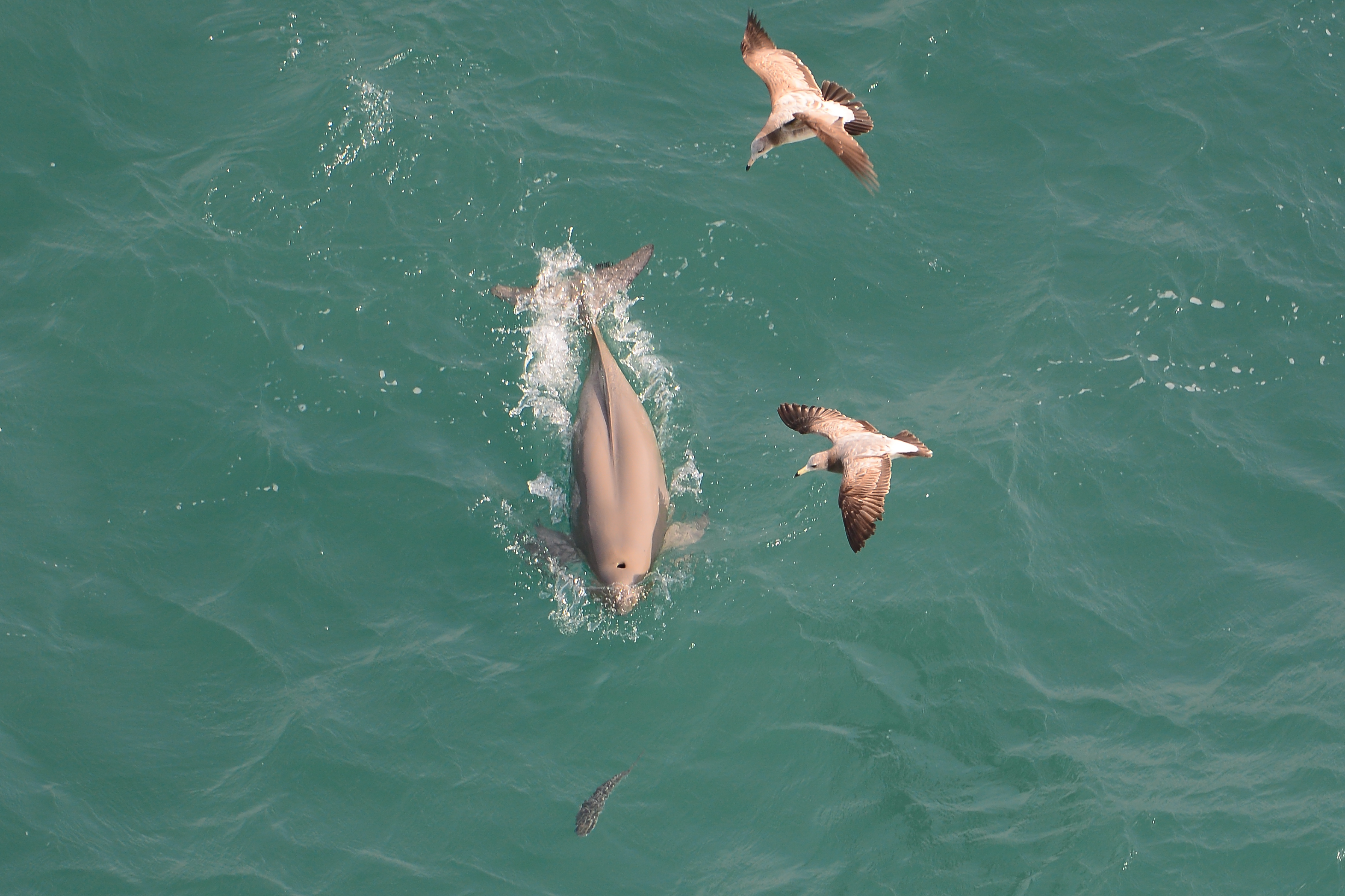 상괭이의 숭어 사냥